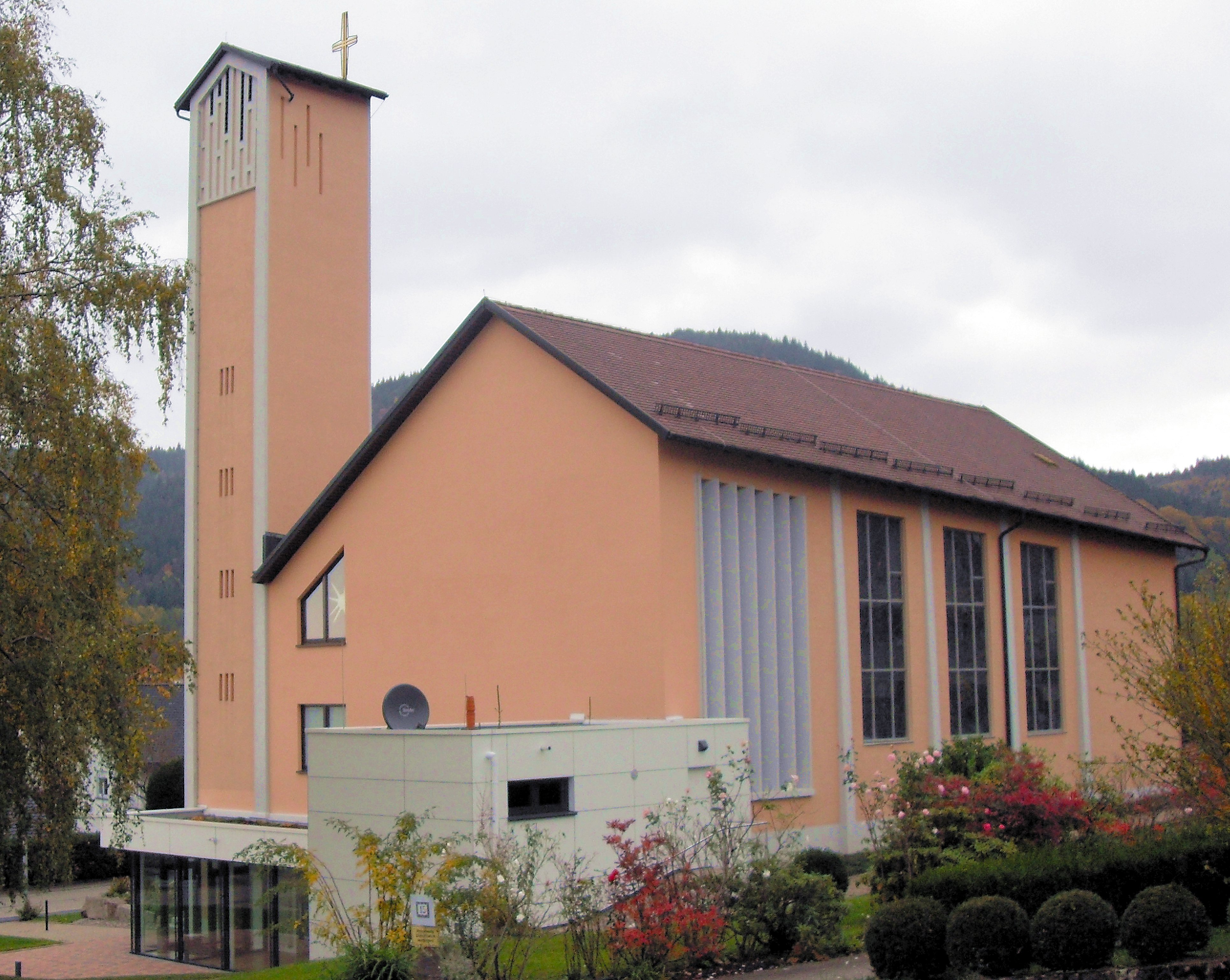 katholische Kirche St. Theresia in Loffenau, Landkreis Rastatt